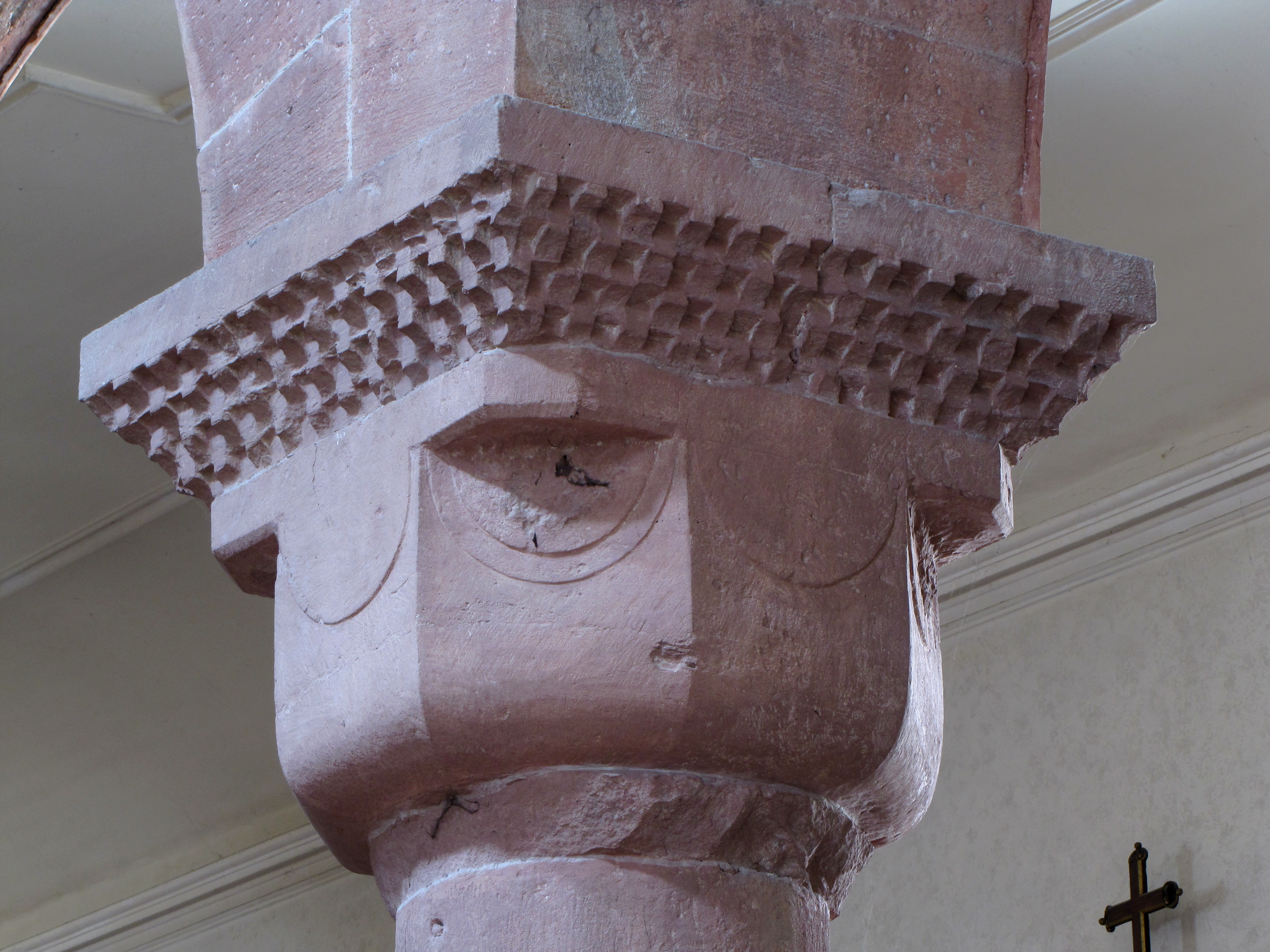 Alsace, Haut-Rhin, Collégiale Saints-Michel et Gangolphe de Lautenbach (PA00085503, IA00054819): Chapiteau roman de la nef.